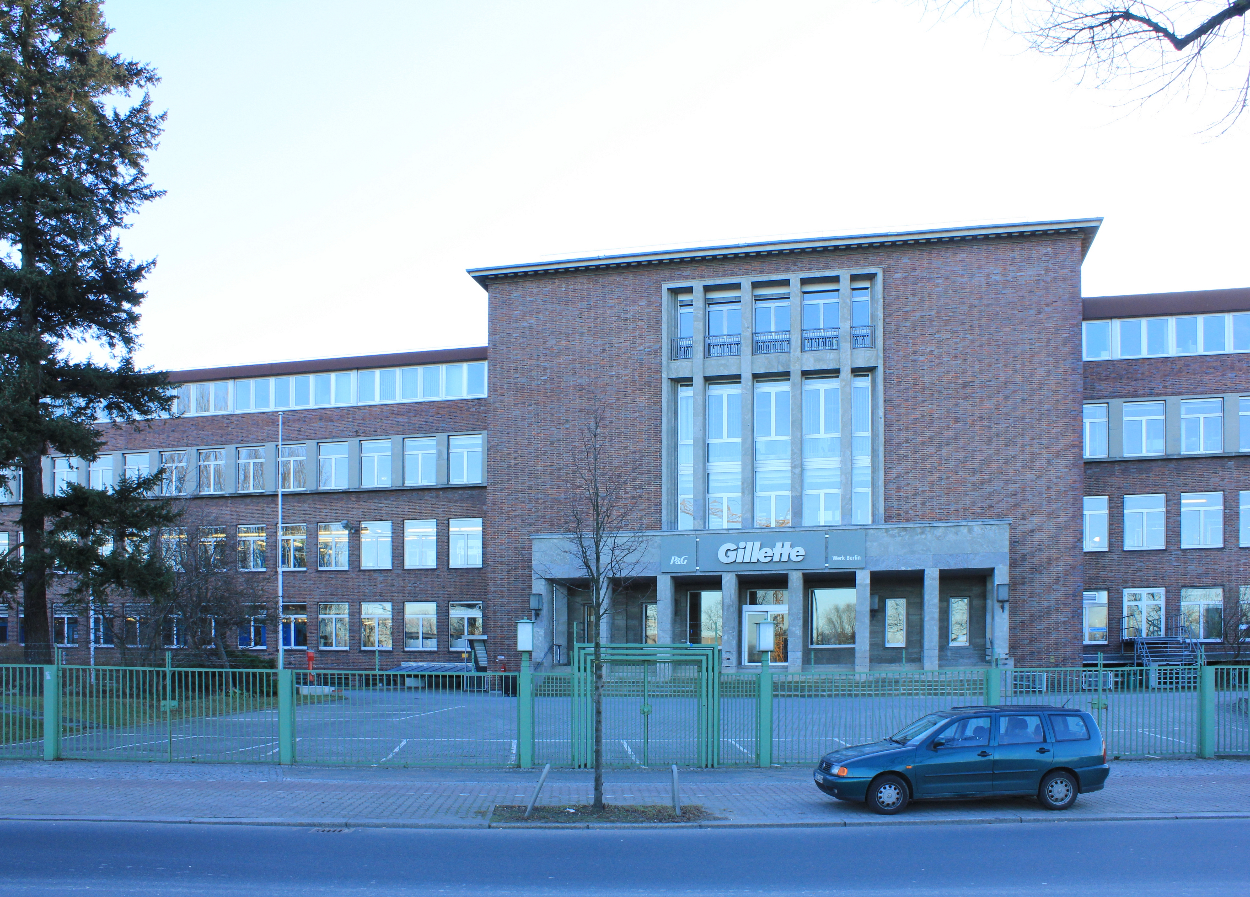 Roth-Büchner AG, Fabrik 1936-39 von Paul Renner